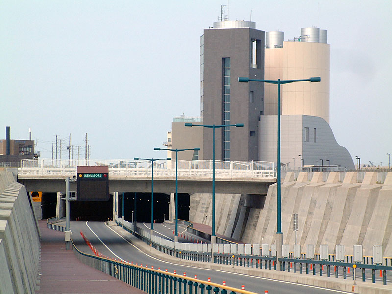 新潟市新潟島と新潟西港をつなぐ水底道路「新潟みなとトンネル」。 入船みなとタワー側より撮影。